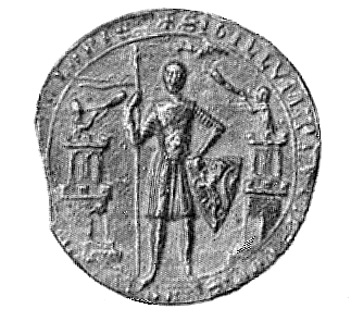 Przemysł I seal